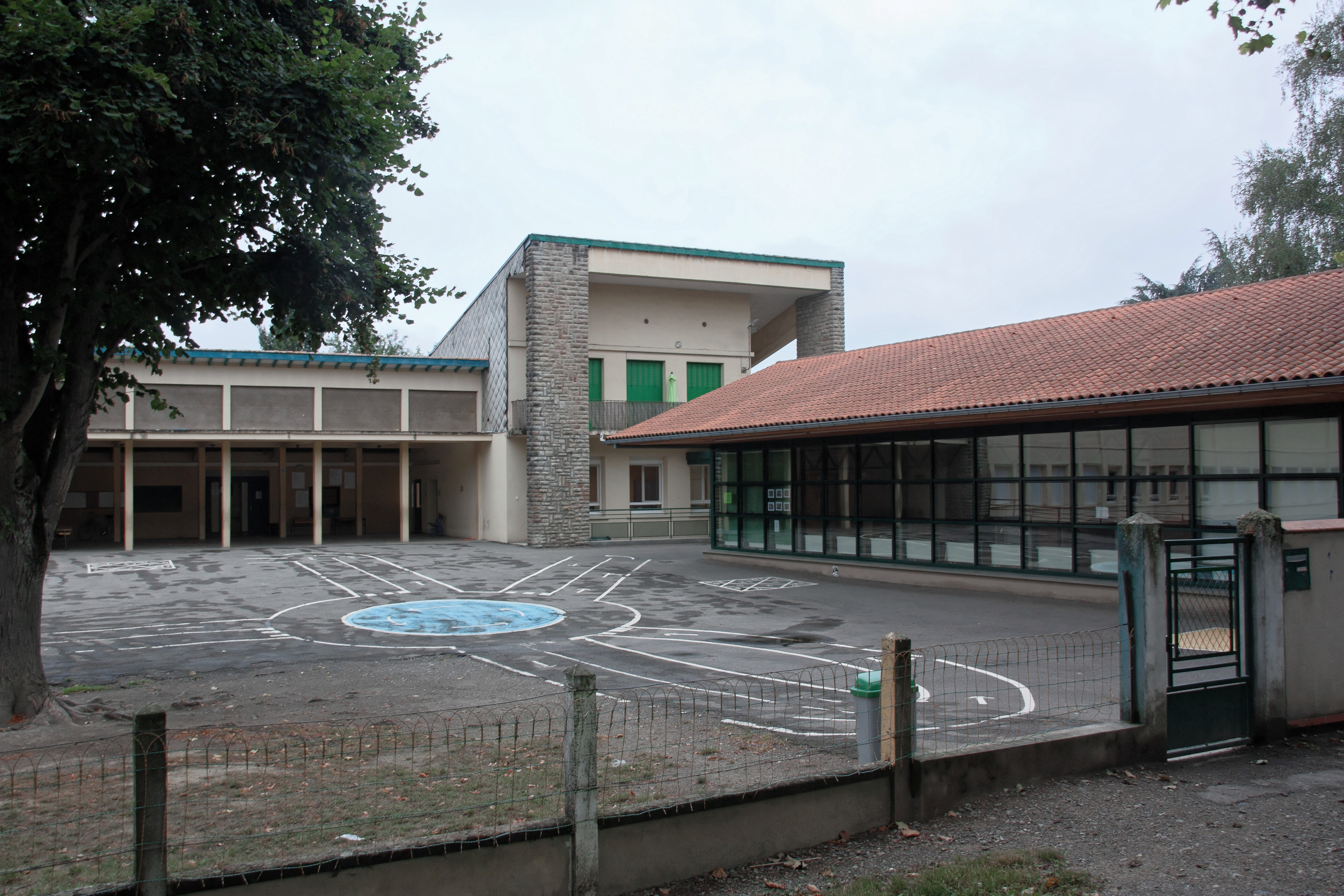 groupe scolaire Fernand Camescasse, Maubourguet, Hautes-Pyrénées, France